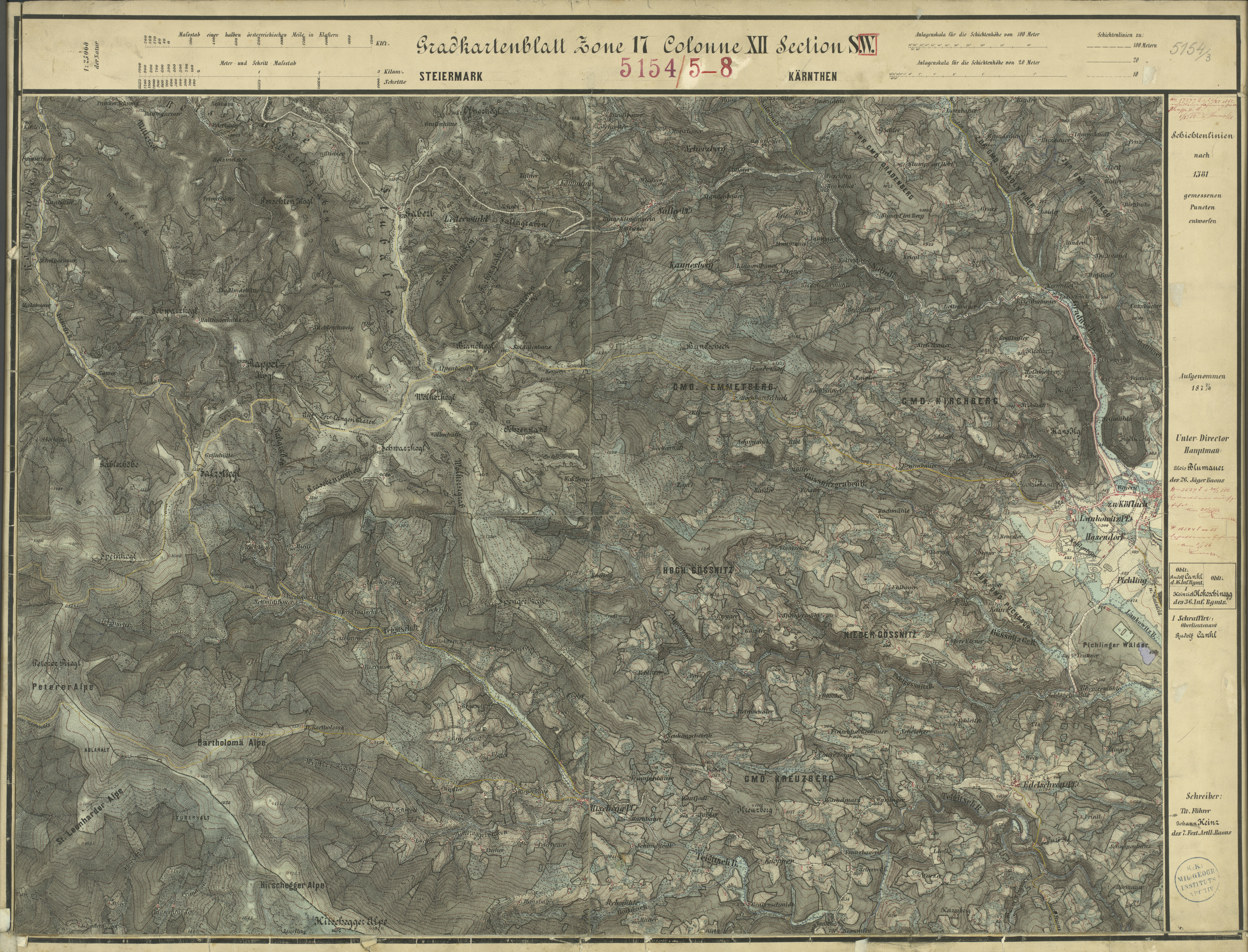 historische Landkarte: Gradkartenblatt Zone 17 Colonne XII Section SW (später 5154/3). Gebiet Köflach, Gaberl, Hirschegg. Franzisco-josephinische (3.) Landesaufnahme der österreichisch-ungarischen Monarchie. Aufnahmeblatt 1:25.000. Aufgenommen 1877/78.